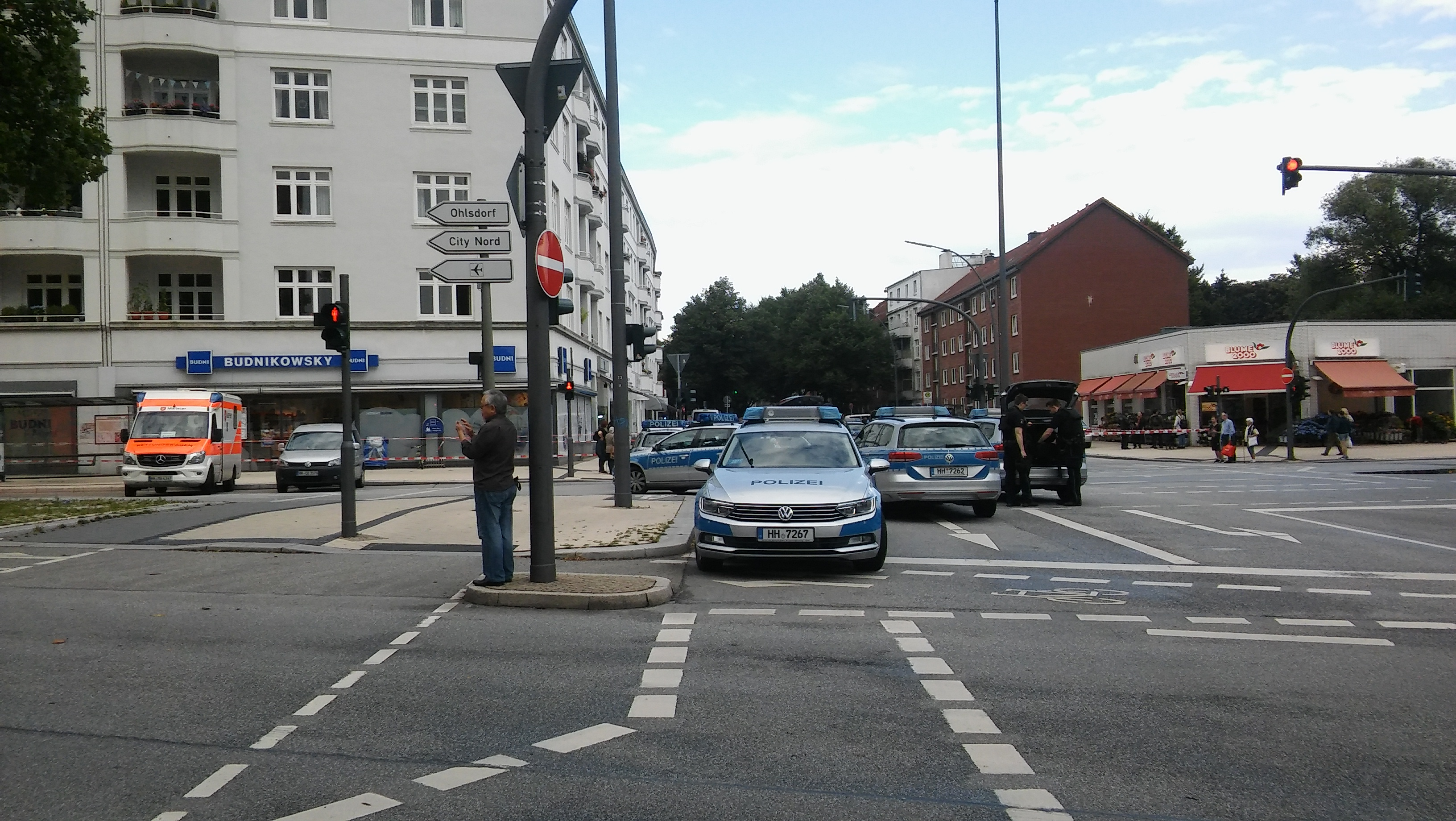 Einsatzkräfte mach der Messerattacke am 28. Juli 2017 in Hamburg-Barmbek-Nord.